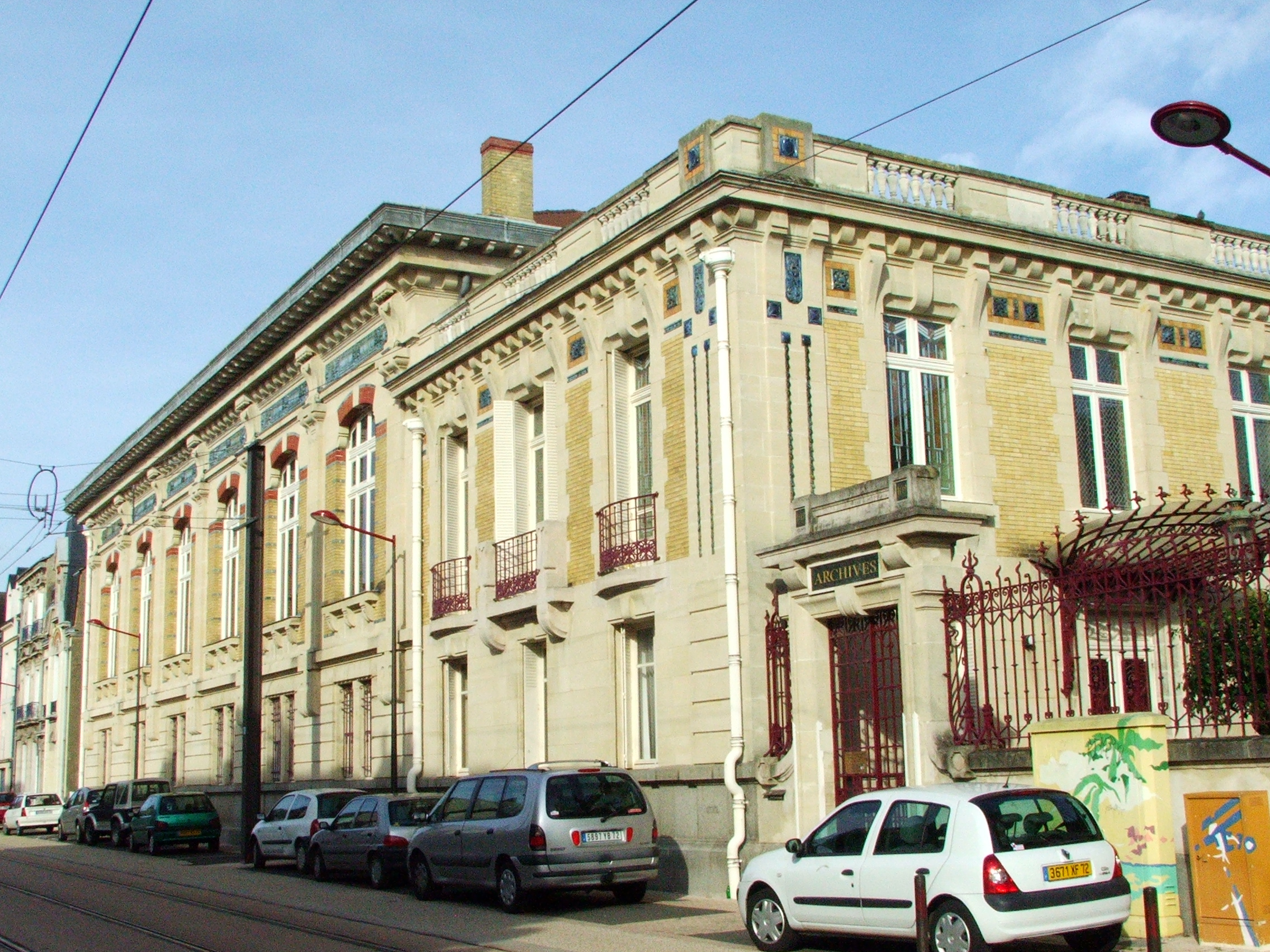 L'ancienne bibliothèque municipale du Mans, avenue Gambetta.